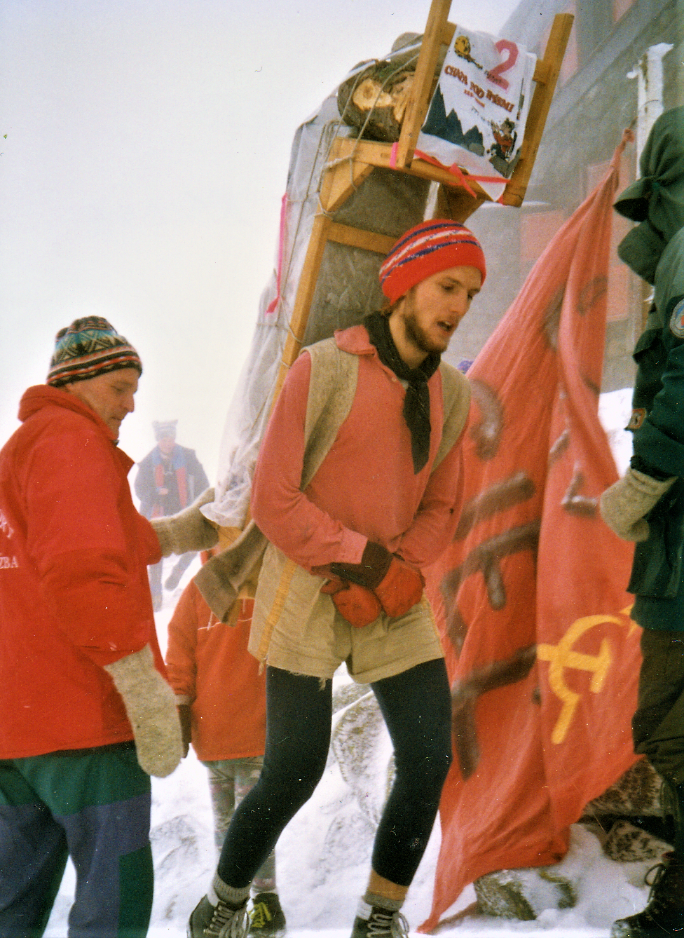 Horský nosič a pracovník Horskej záchrannej služby Eduard Lipták na pretekoch horských nosičov Sherpa rallye na Chate pod Rysmi vo výške 2250 m.n.m. , október 1996